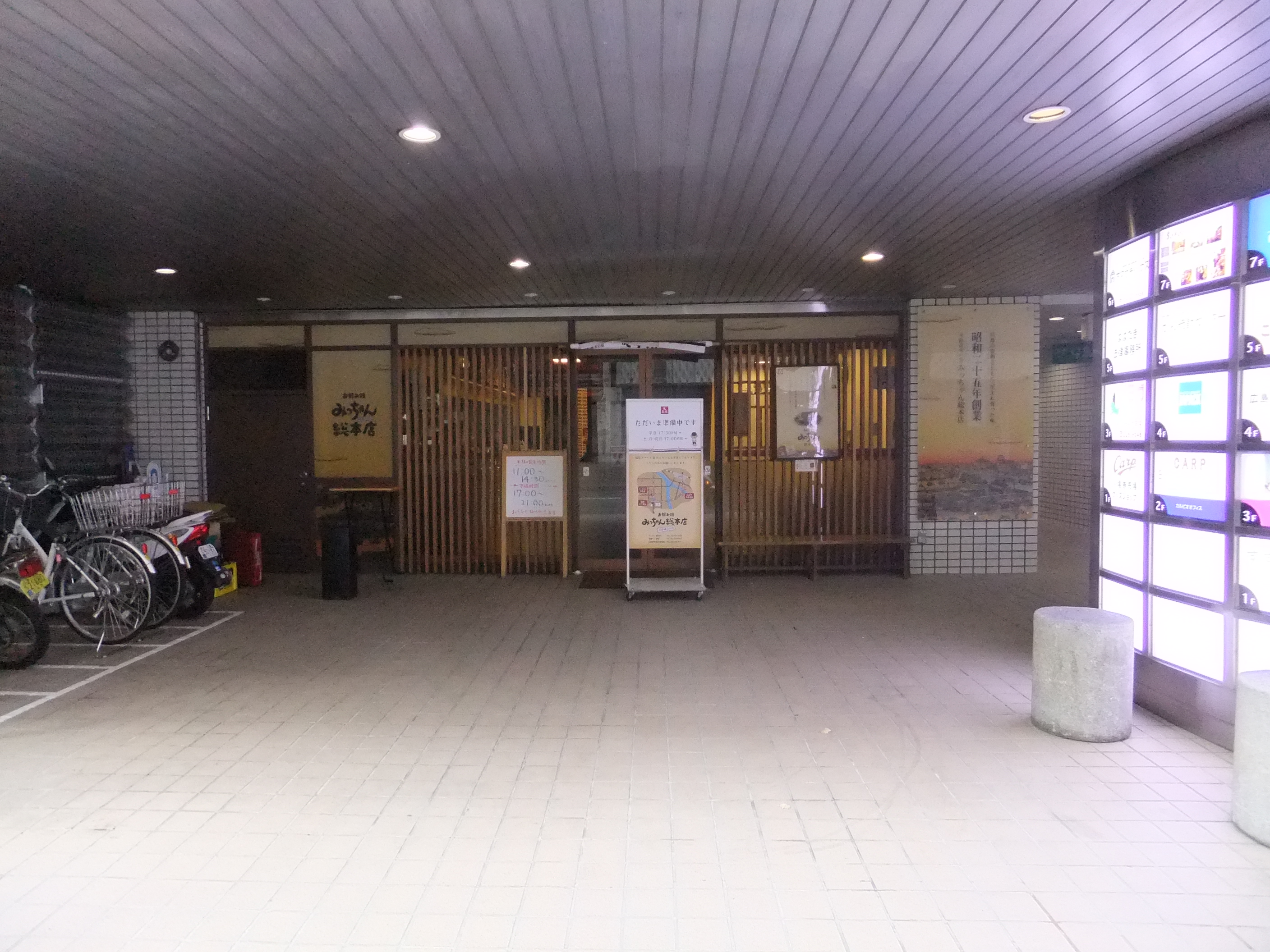 みっちゃん総本店